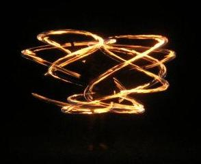 Utövare med eldstav, sommaren 2006. Bilden är tagen med lång exponeringstid.